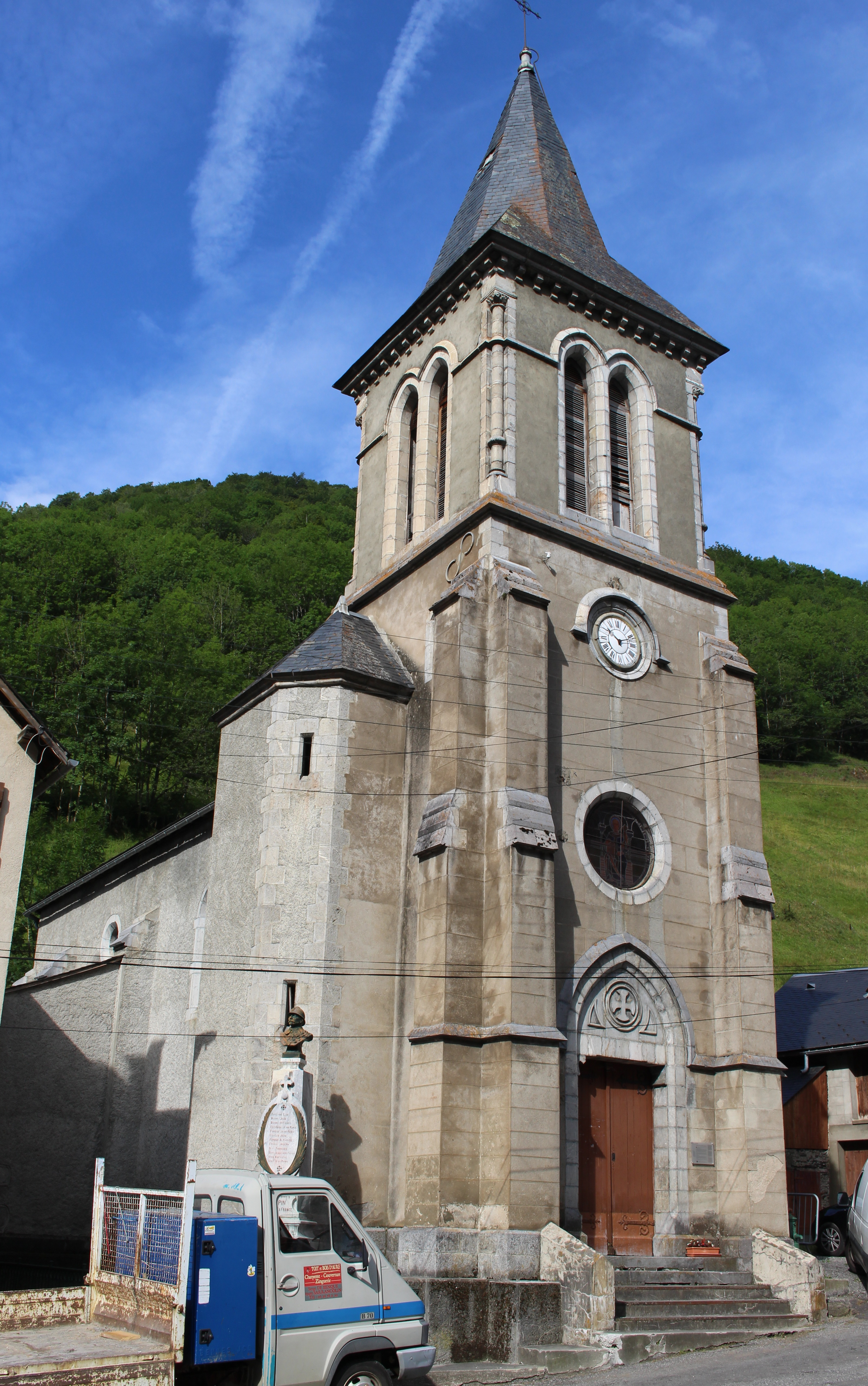 Église Saint-Martin d'Aspin-Aure (Hautes-Pyrénées)